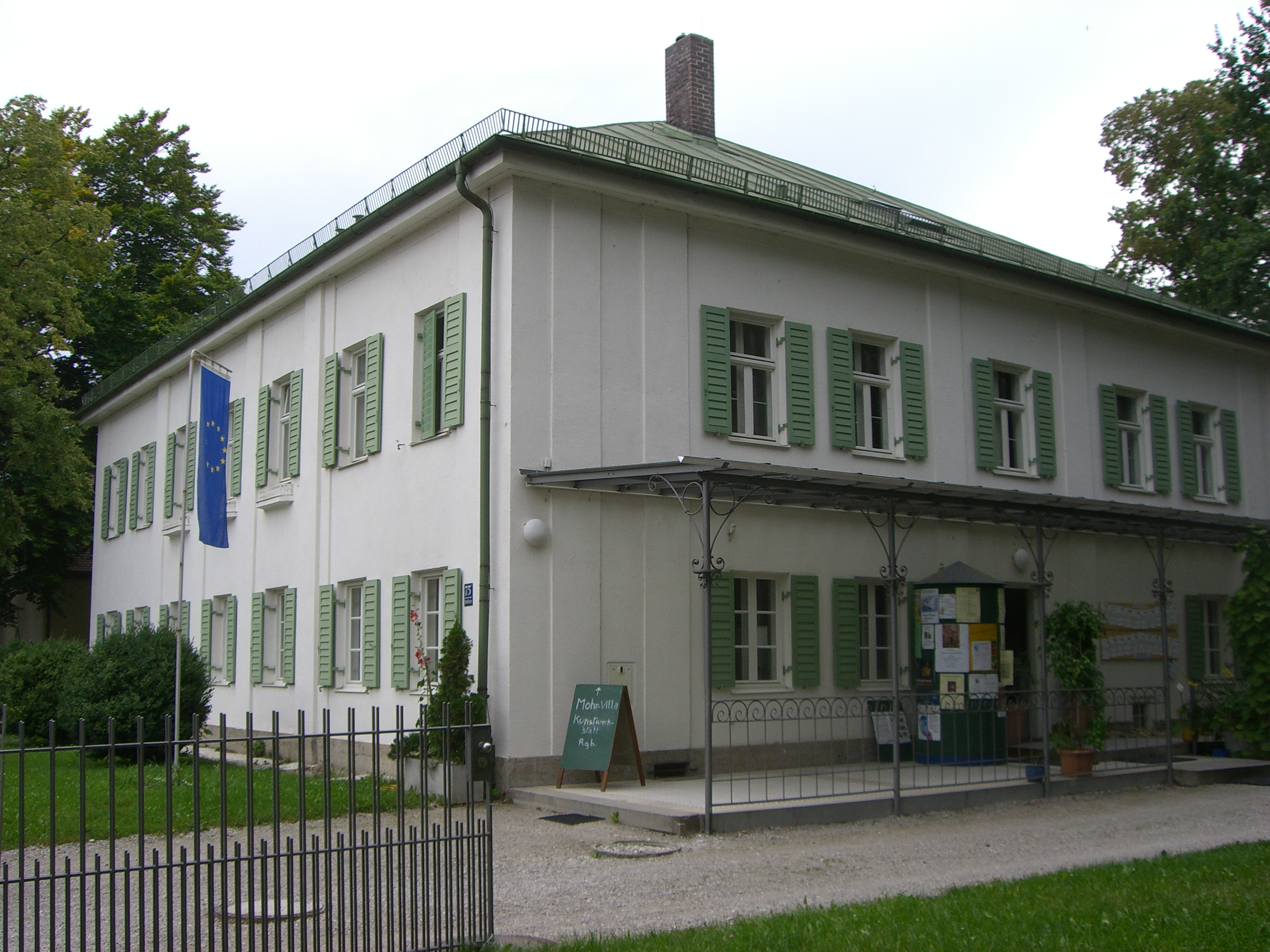 München - Mohr-Villa.jpg